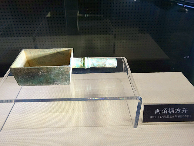 秦朝颁行的标准量器，两侧刻有始皇二十六年和秦二世元年诏文。